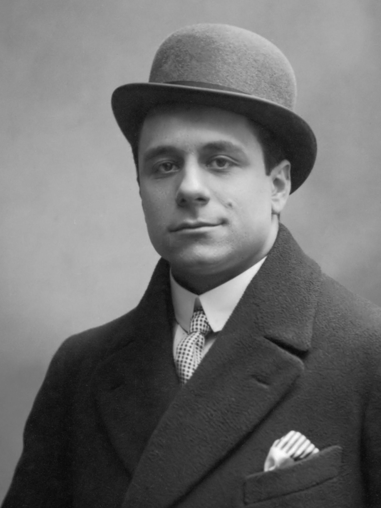 Louis de Bree, acteur en directeur van het Centraal Toneel